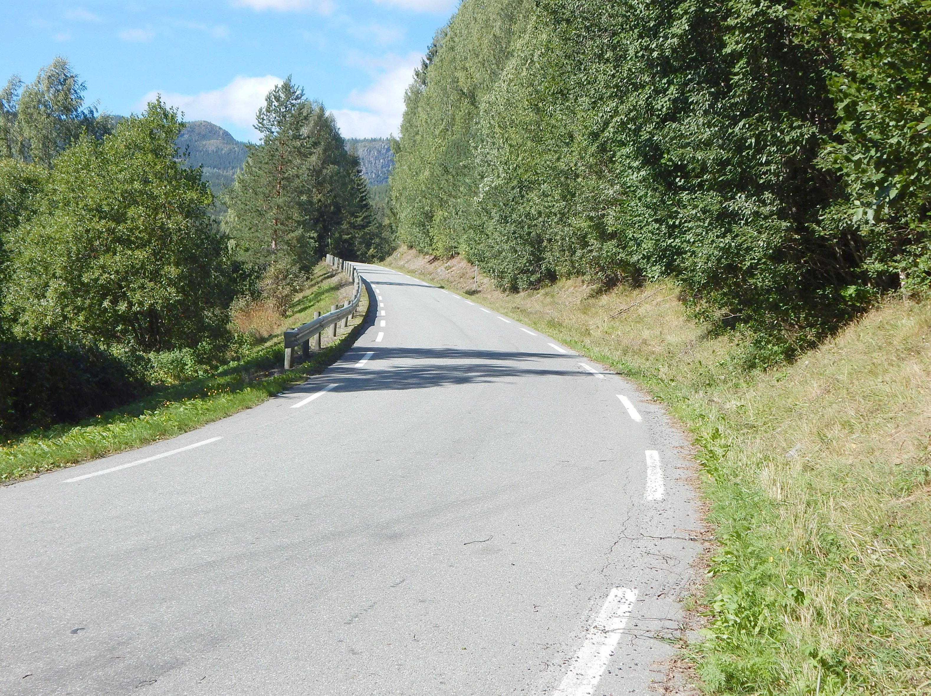 Mosvinga (fylkesvei 2428, tidl. 189) nede ved primær fylkesvei 33 (Nordsinni)